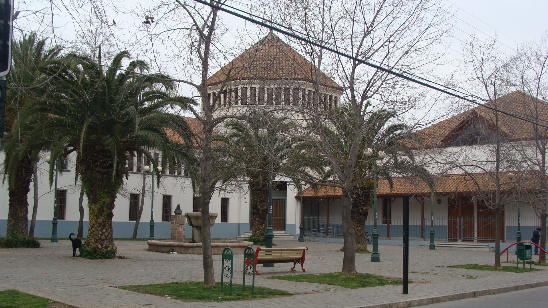 Plazuela Marcelino Champagnat o Santa Cruz de Triana This is a photo of a national monument in Chile: 376